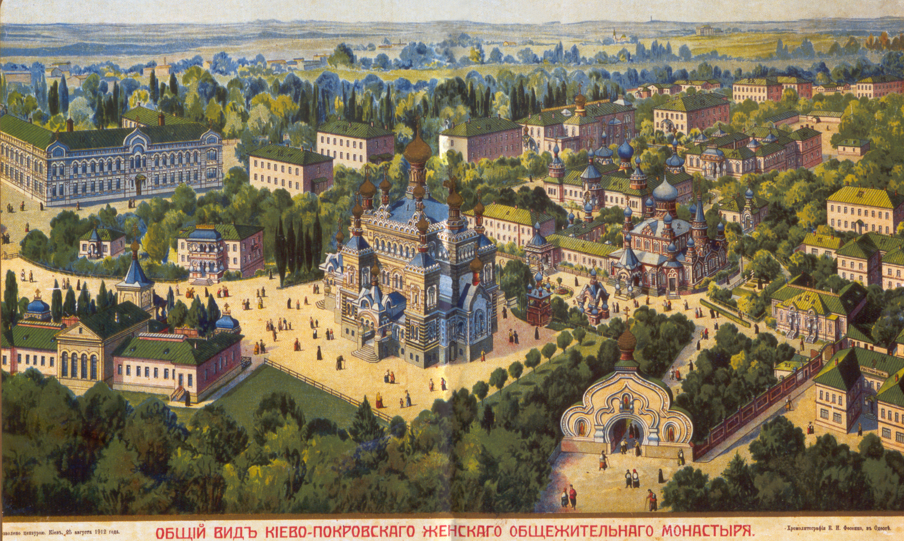 Києво-Покровський жіночий монастир. Загальний вигляд. Хромолітографія 1912 р.